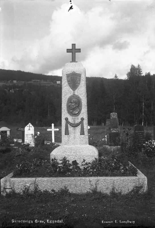 Christian Skredsvigs grav i Eggedal. Gravlund, bauta, gravsted, portrettrelieff. Esther Langberg fotograferte bl.a. for bladet Urd. Hun testamenterte ca 1600 negativer til Oslo Bymuseum i 1975.